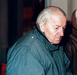 Tadeusz Dobrzeniecki, historyk mediawista, kustosz